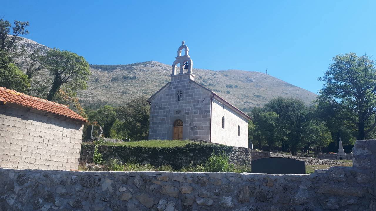 Храм Св. пророка Илије